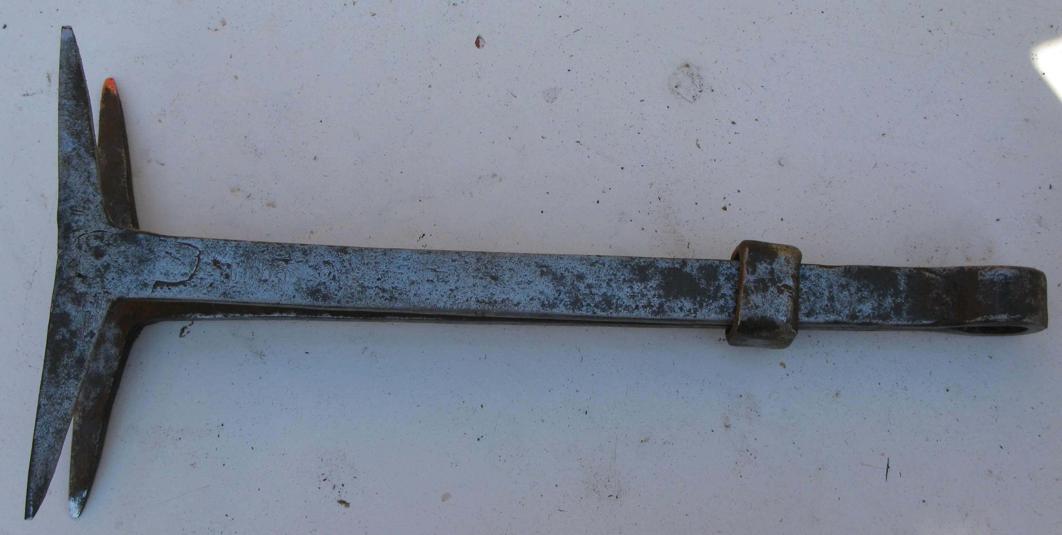 Meddrag.